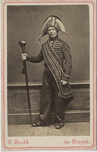 Tartu ülikooli peahoone portjee pidukuues